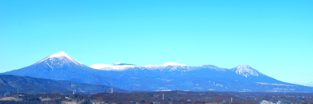 たちばな天文台からは、霧島連峰を一望する事が出来ます。